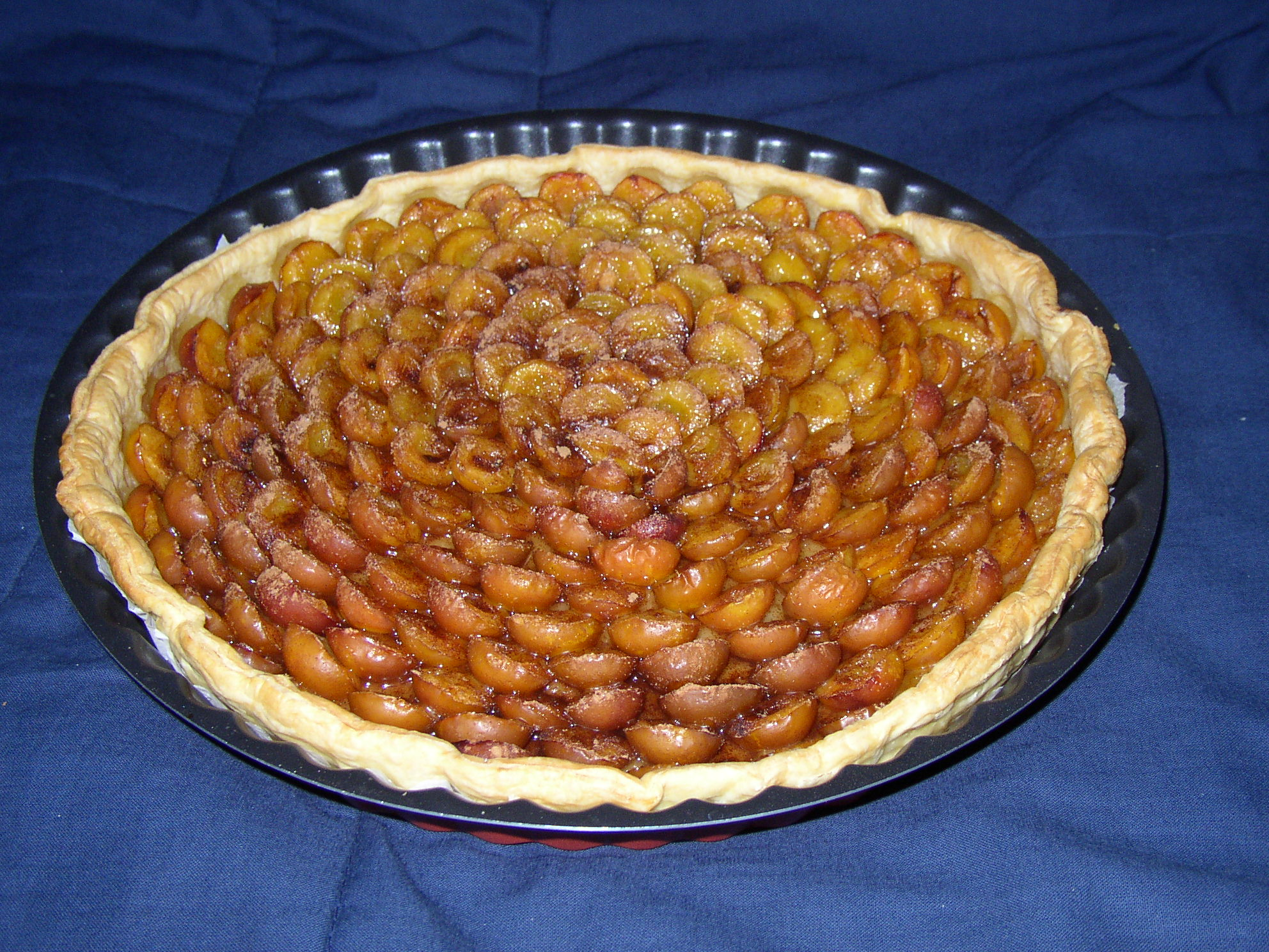 Tarte à la mirabelle. Photo prise par Sam Hocevar.